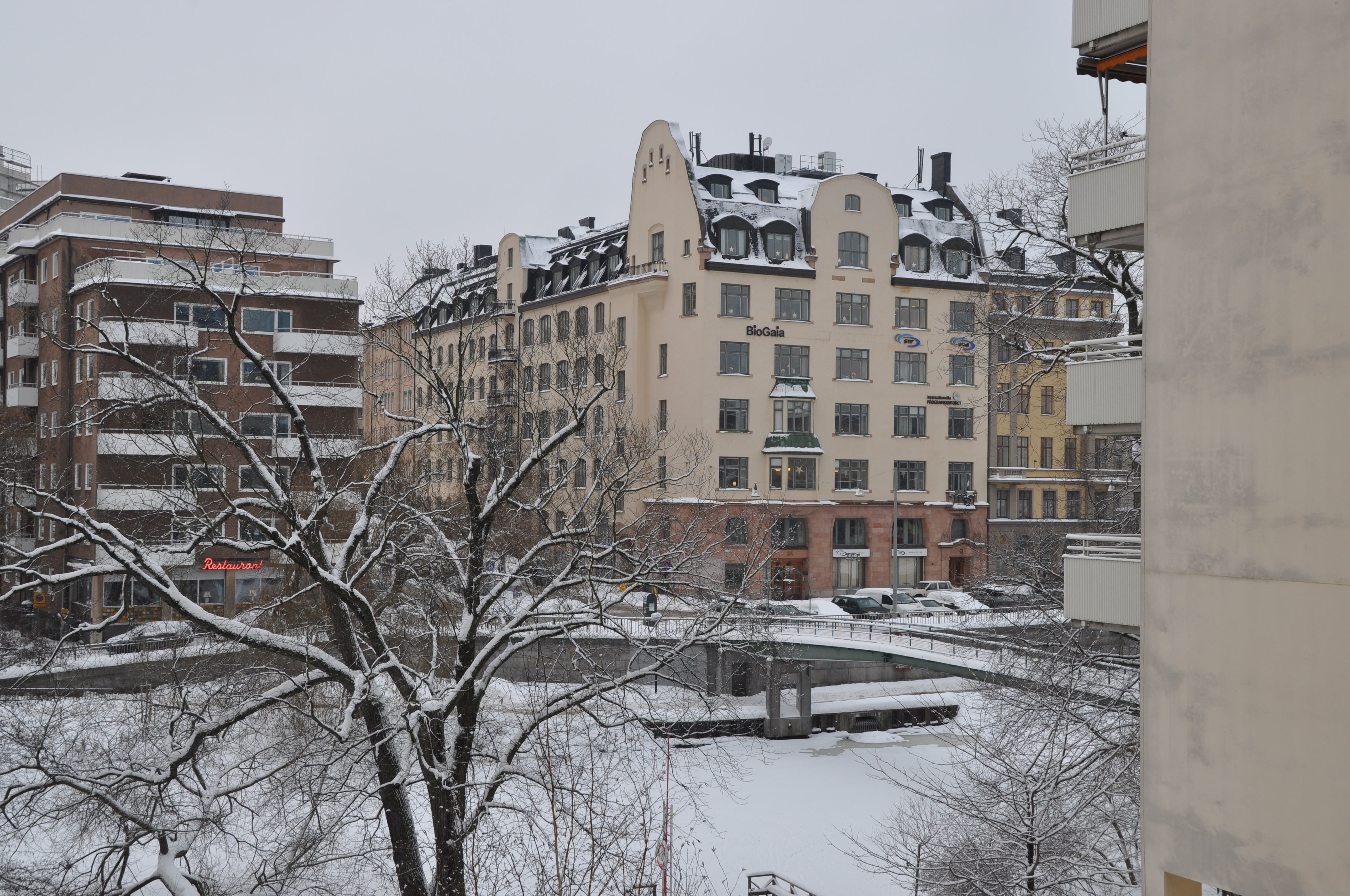 Kungsbroplan 3. Byggnadsår 1907-09 arkitekt Fredrik Falkenberg. Byggherre och ursprunglig verksamhet AB Hasse W Tullbergs tryckeri